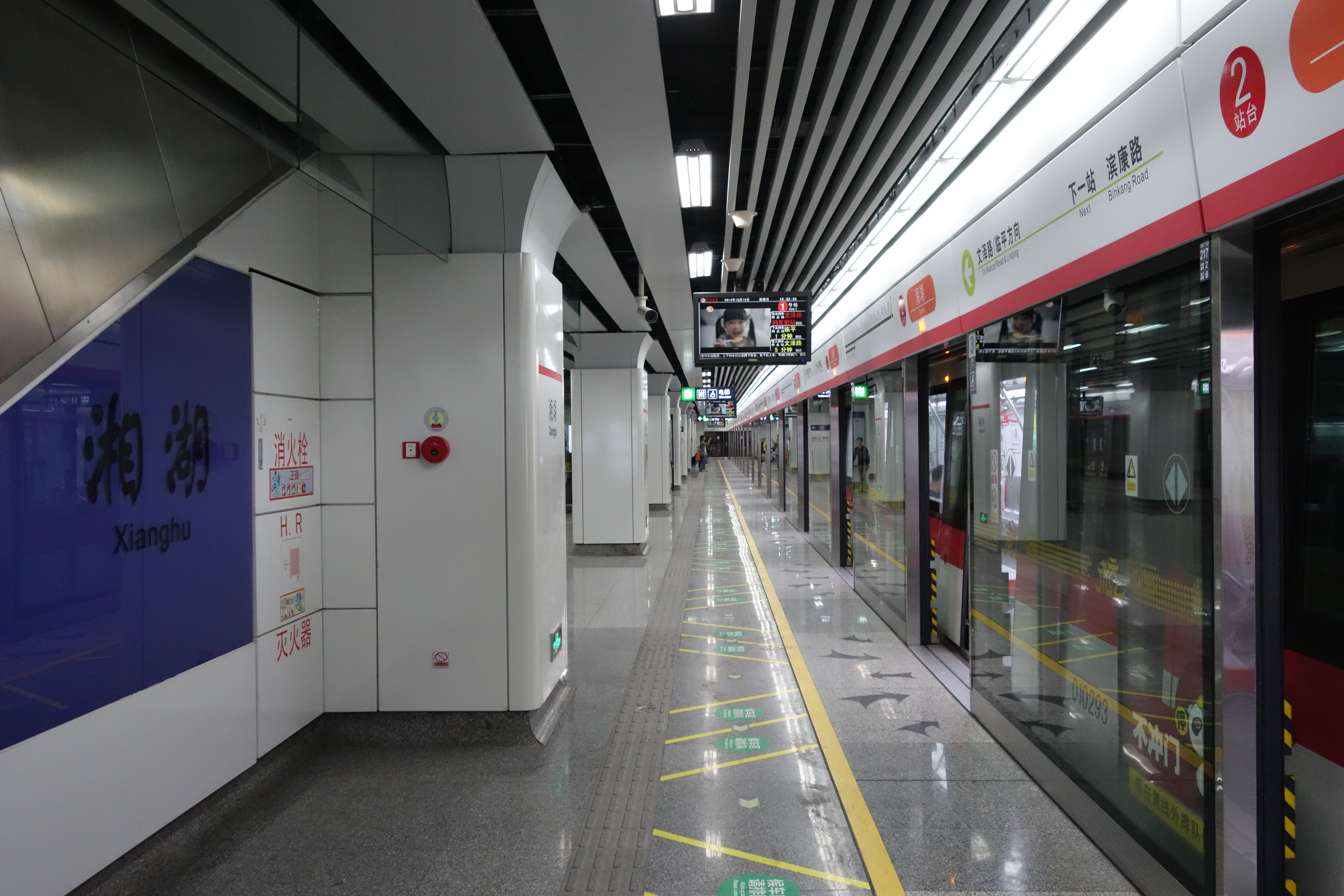 杭州地铁湘湖站